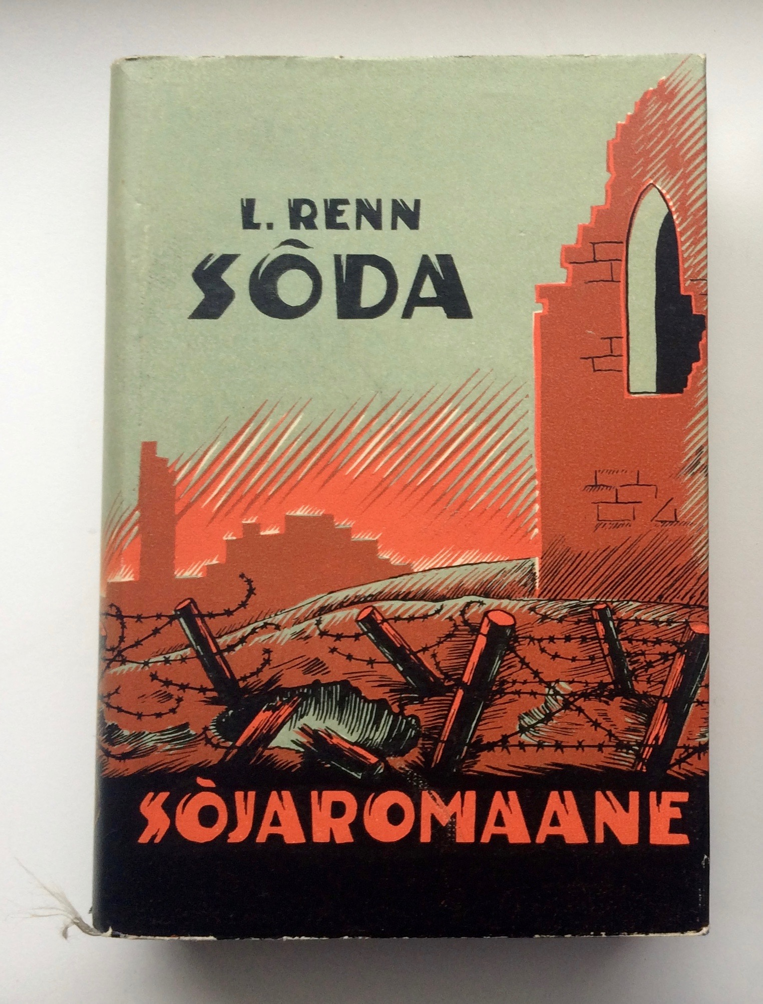 Esikaas